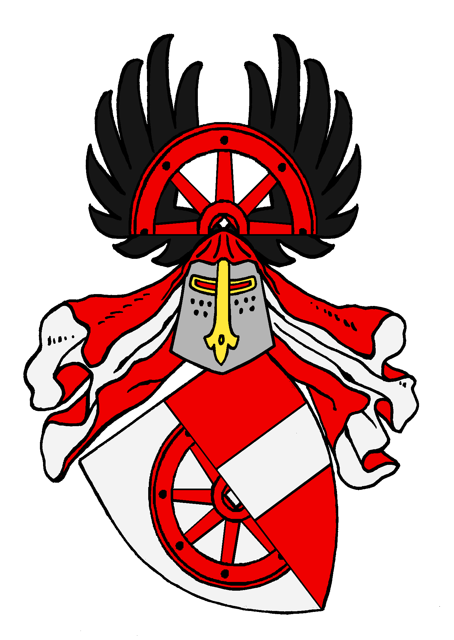 Wappen der von Cramon oder auch Cremon, einer bis heute bestehenden Familie des mecklenburgischen Uradels.